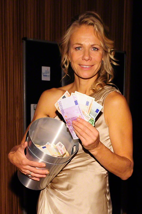 Claudine Wilde auf der Dolphin Aid Gala in Düsseldorf am 30. November 2013.